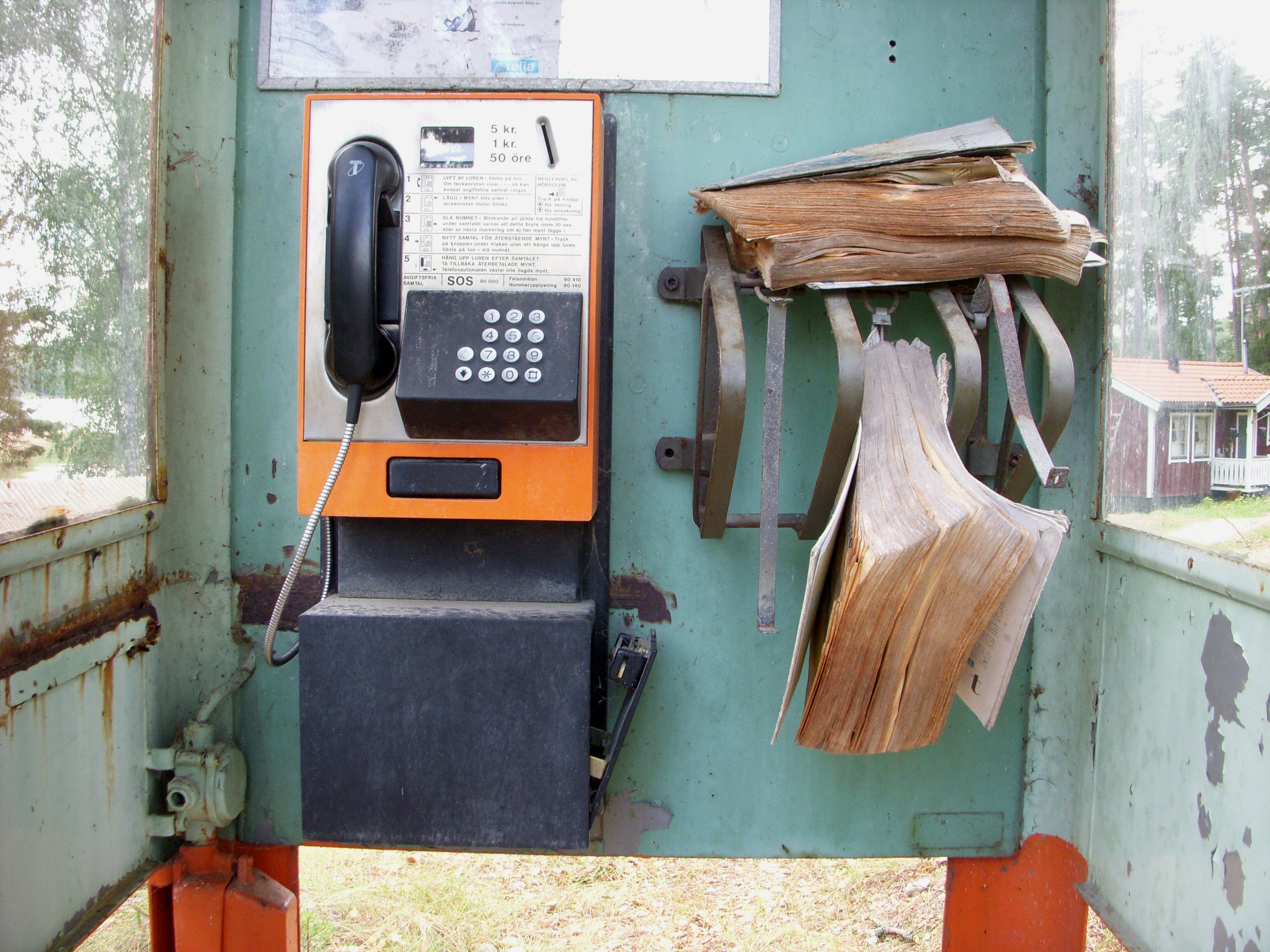 Mynttelefon i äldre svensk telefonkiosk på landsbygden